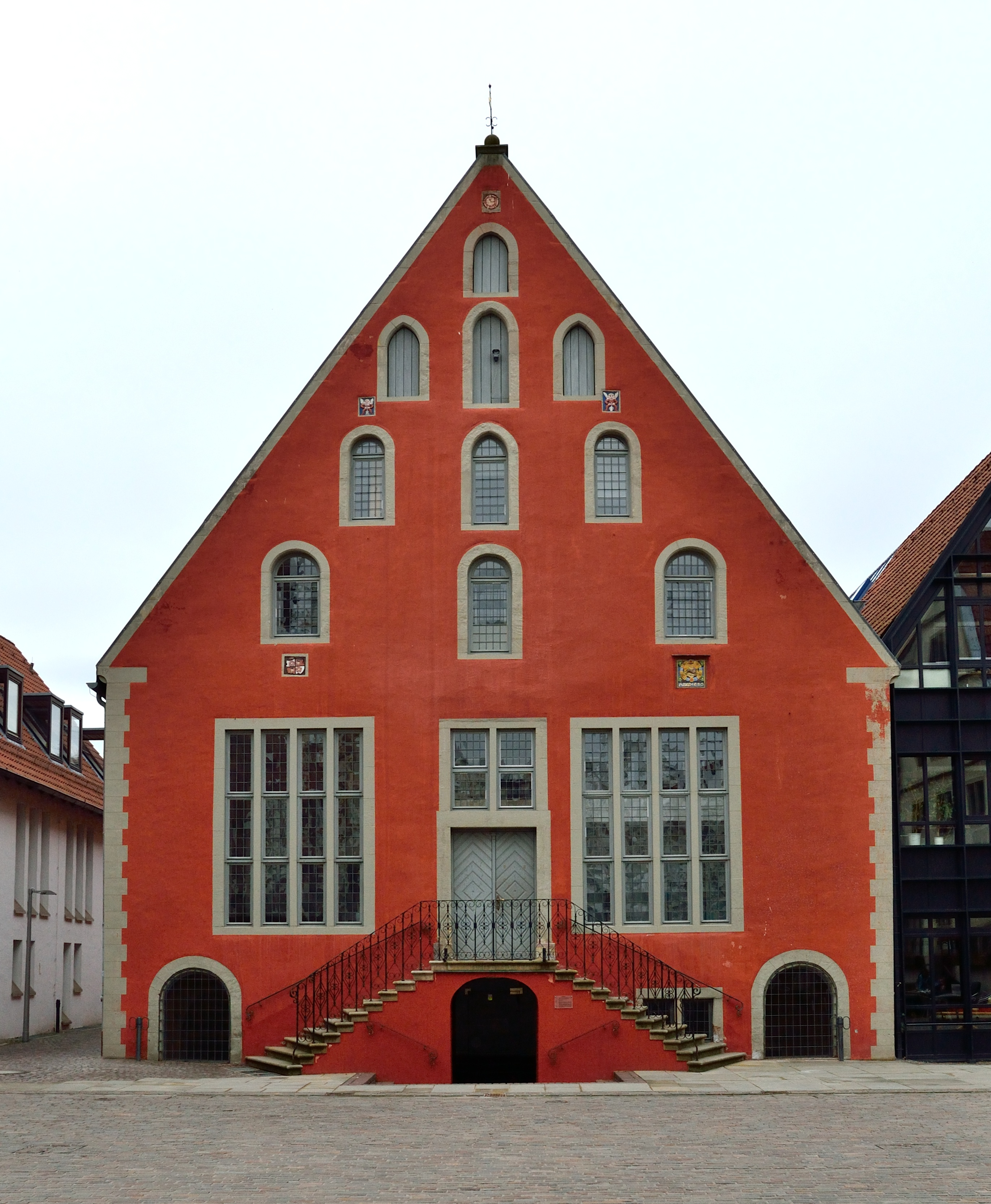 This is a photograph of an architectural monument.It is on the list of cultural monuments of Lemgo Nordseite des Ballhauses